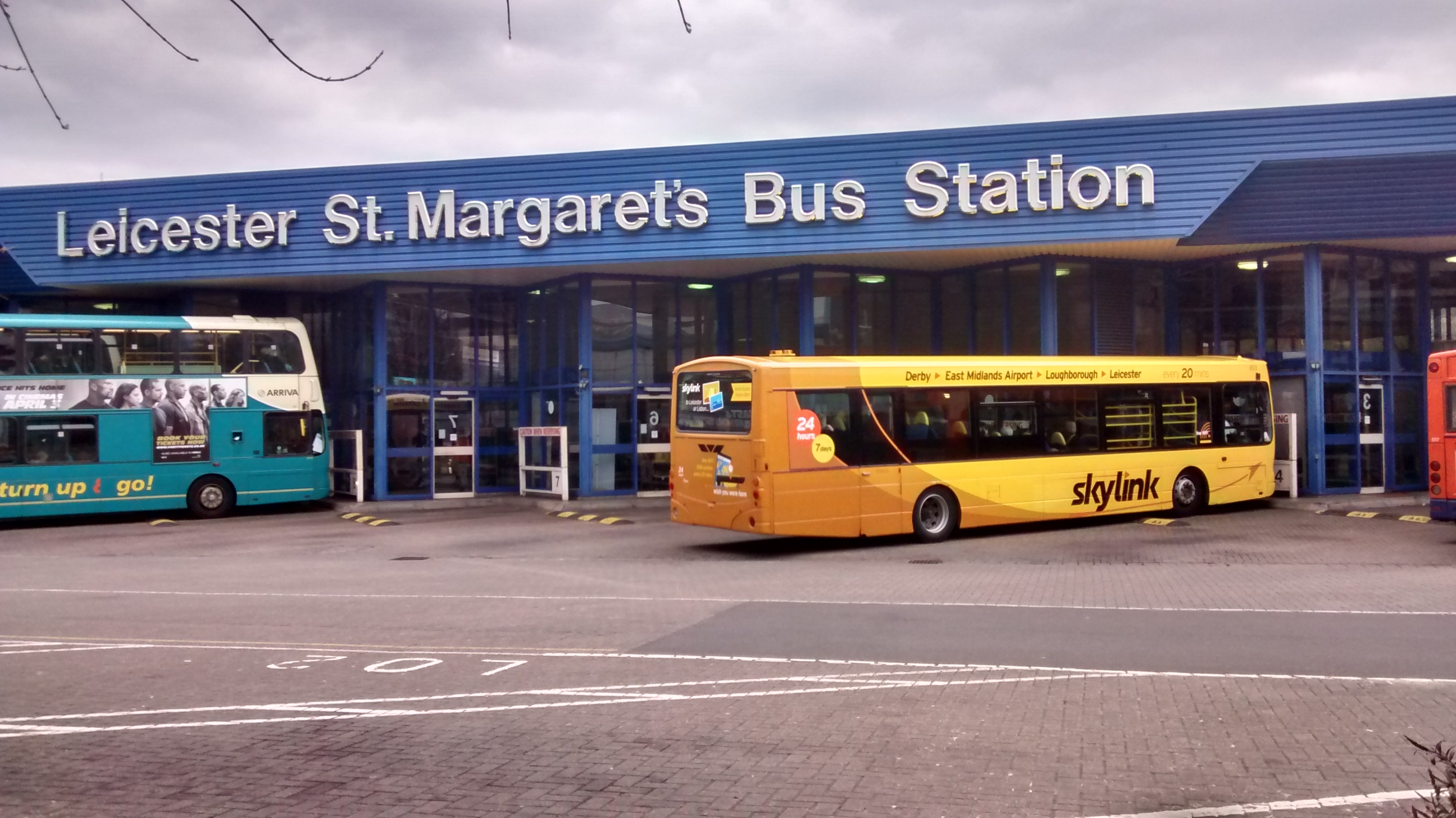 Dworzec od strony zachodniej